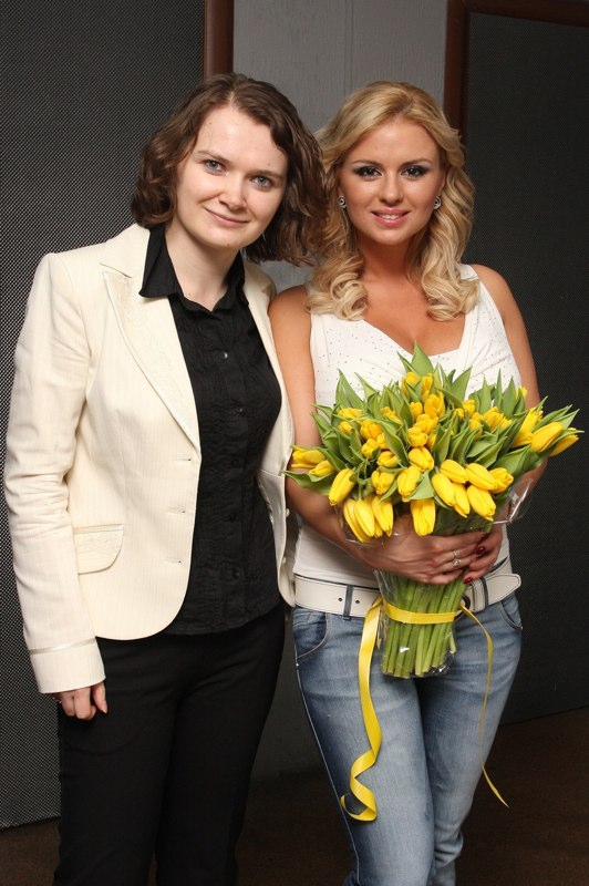 Анна Семенович и Лилия Шарловская